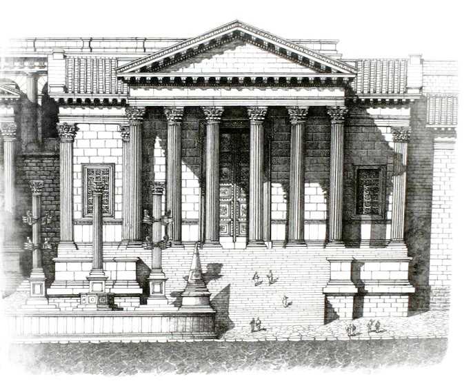 Reconstitution du temple de la Concorde, d'après F. Corni.